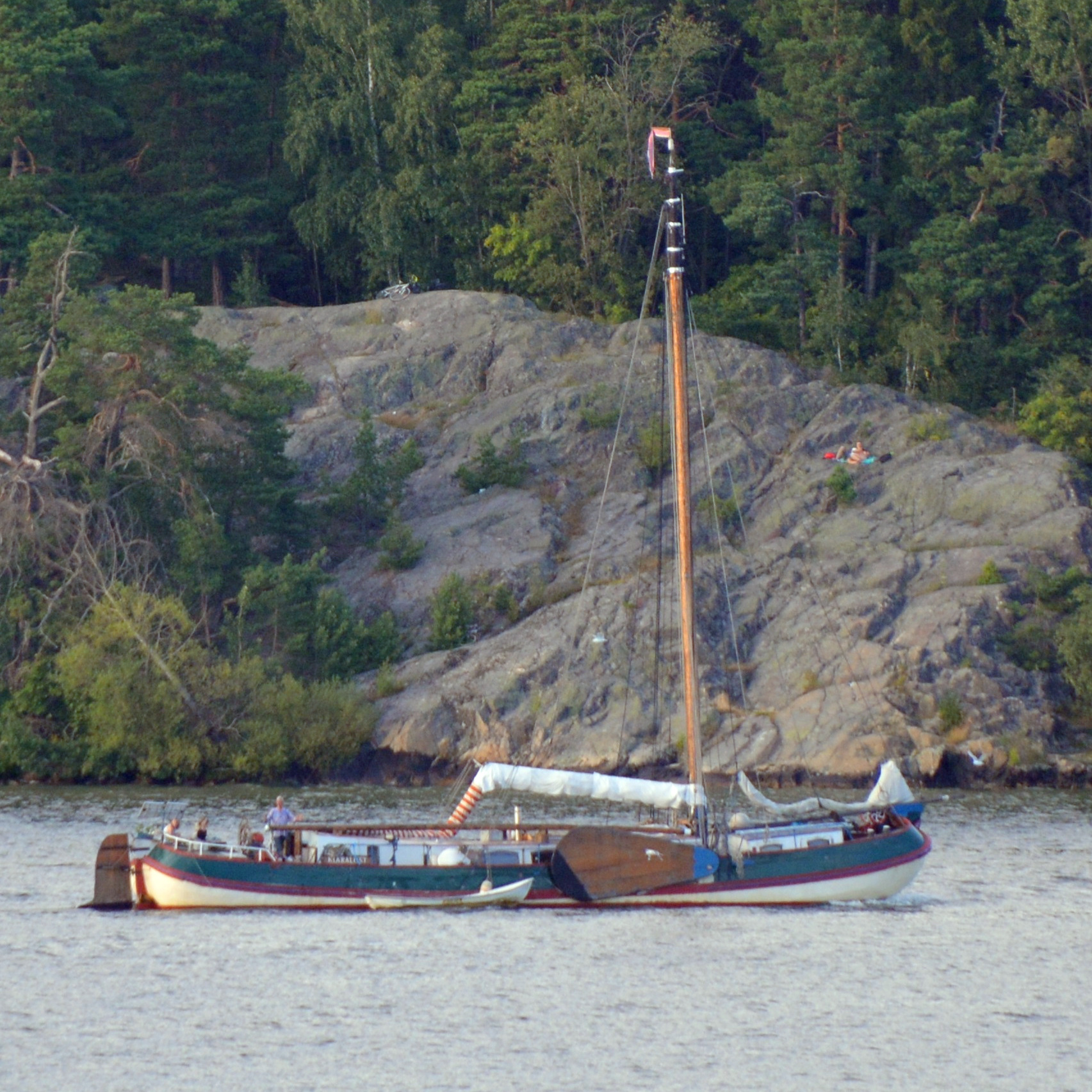 Dutch built tjalk Vertrouwen from 1910 on lake Mälaren, Stockholm This is an image of a protected Swedish ship, with call sign SKCI .